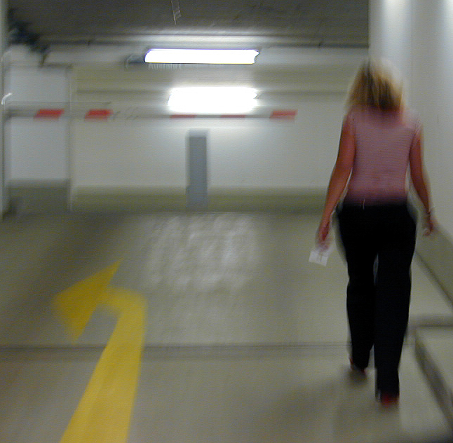 Angst in der Tiefgarage - Symbolbild